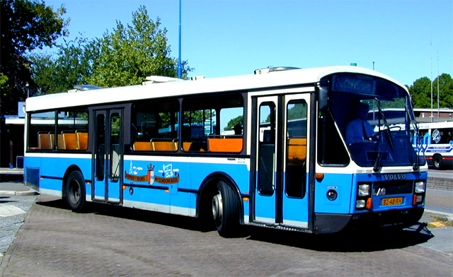 Pieper uit Nieuw-Schoonebeek bus 44 (kent: BZ-48-RH) van het type LAG AI450 / Volvo B10R-55 te Emmen. Dit was de enige streekbus door de Belgische LAG (Lambert & Arnold Geusens) te Bree inmiddels ondergebracht als museumbus bij Nationaal Bus Museum.